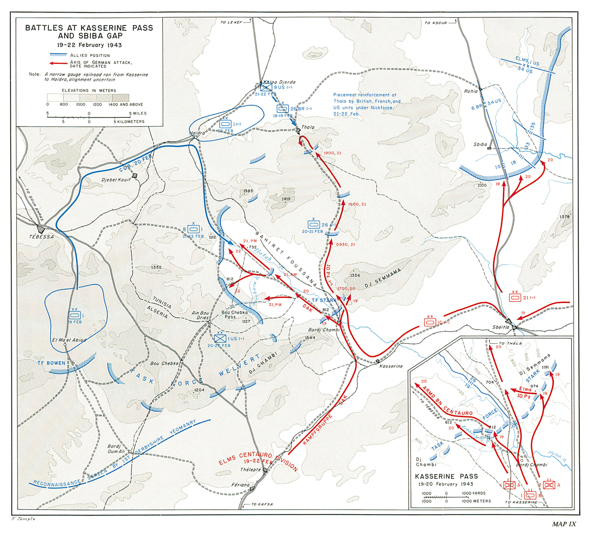 Bataille de Kasserine Carte insérée dans US Army in World War II - Northwest Africa - Seizing the Initiative in the West